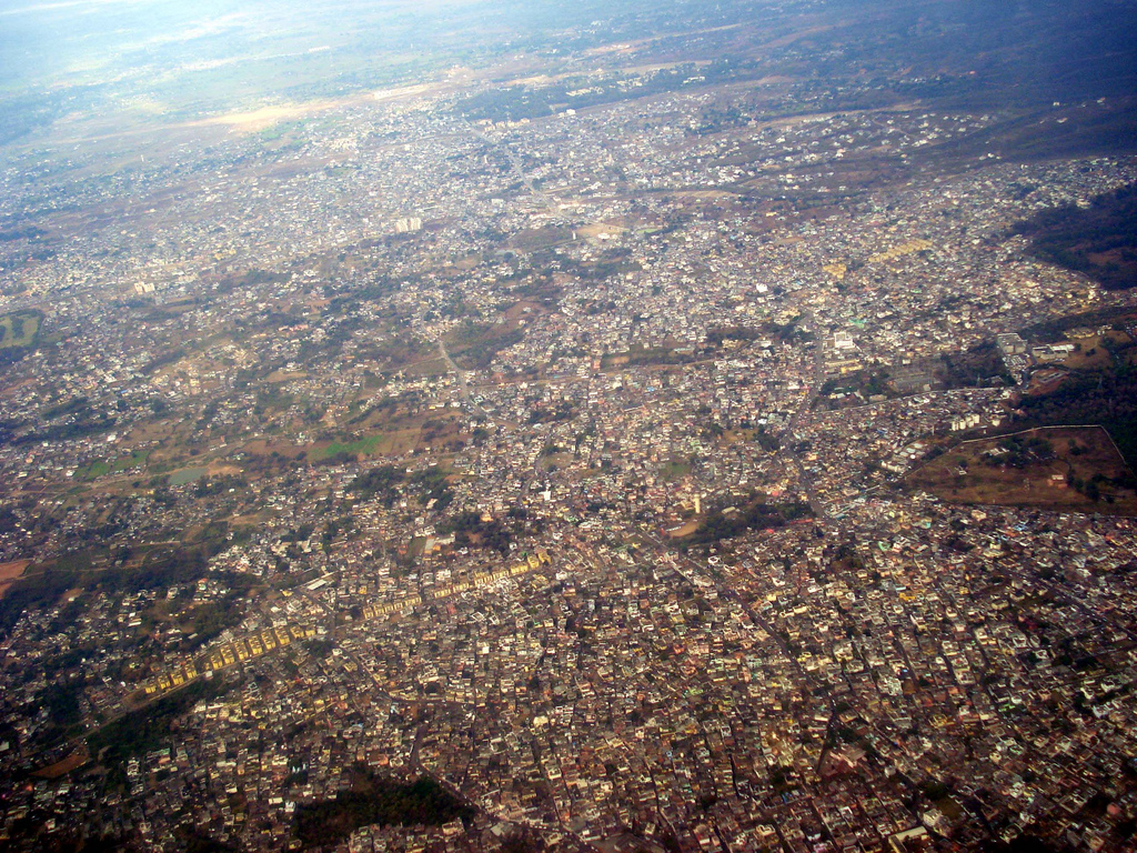 jammu city